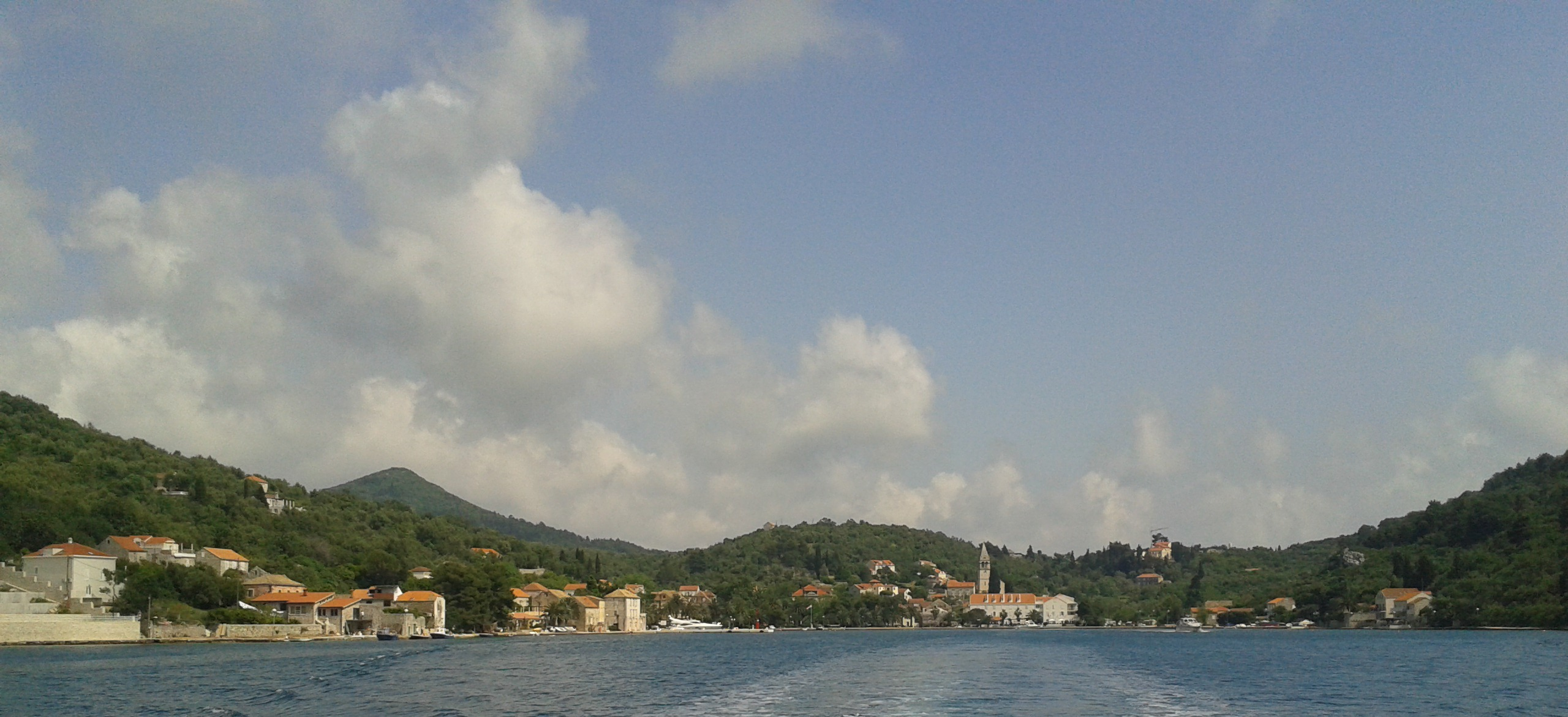 Pogled s morske strane na Šipansku Luku